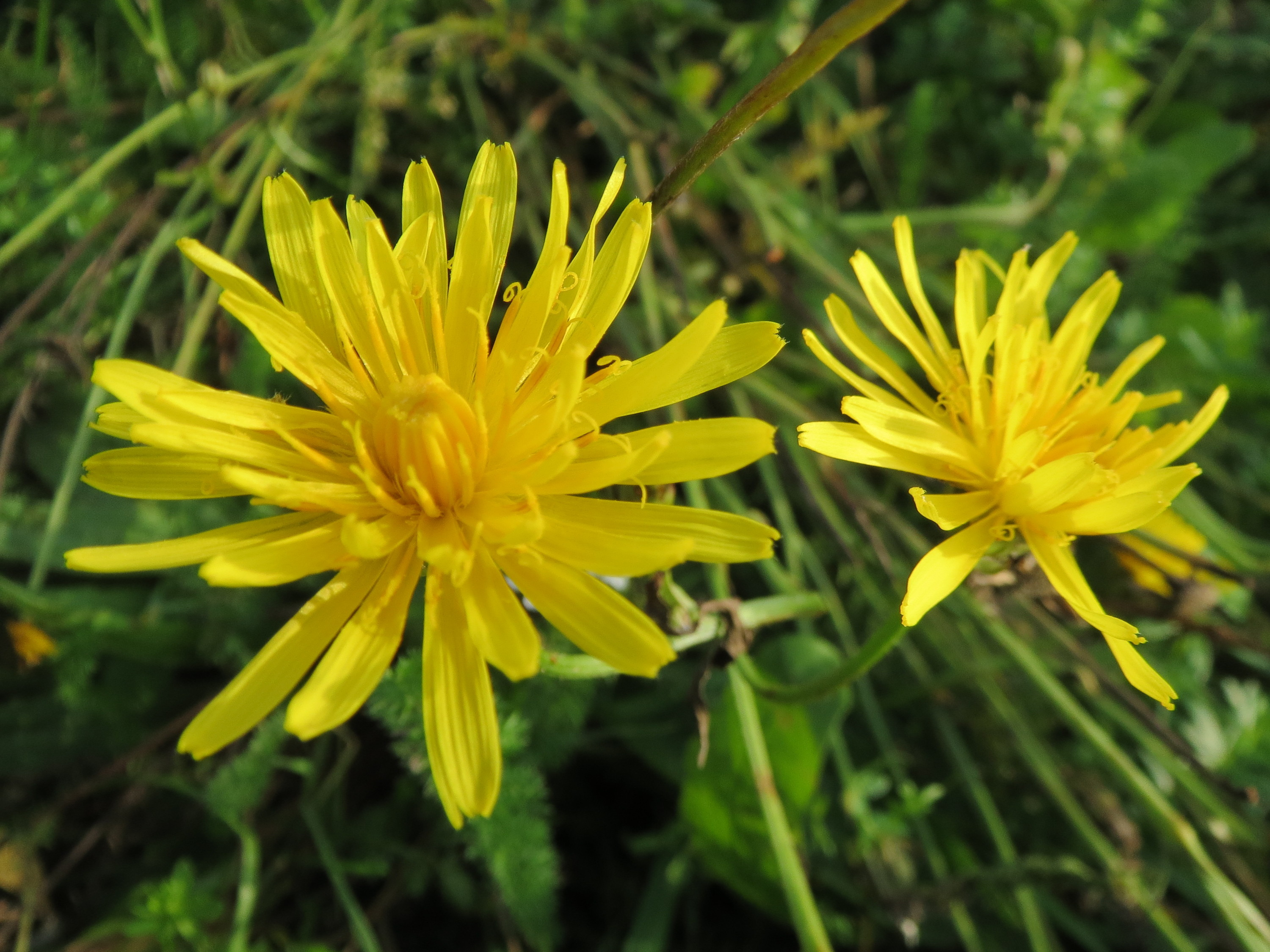 Wiesen-Pippau (Crepis biennis) im Hockenheimer Rheinbogen